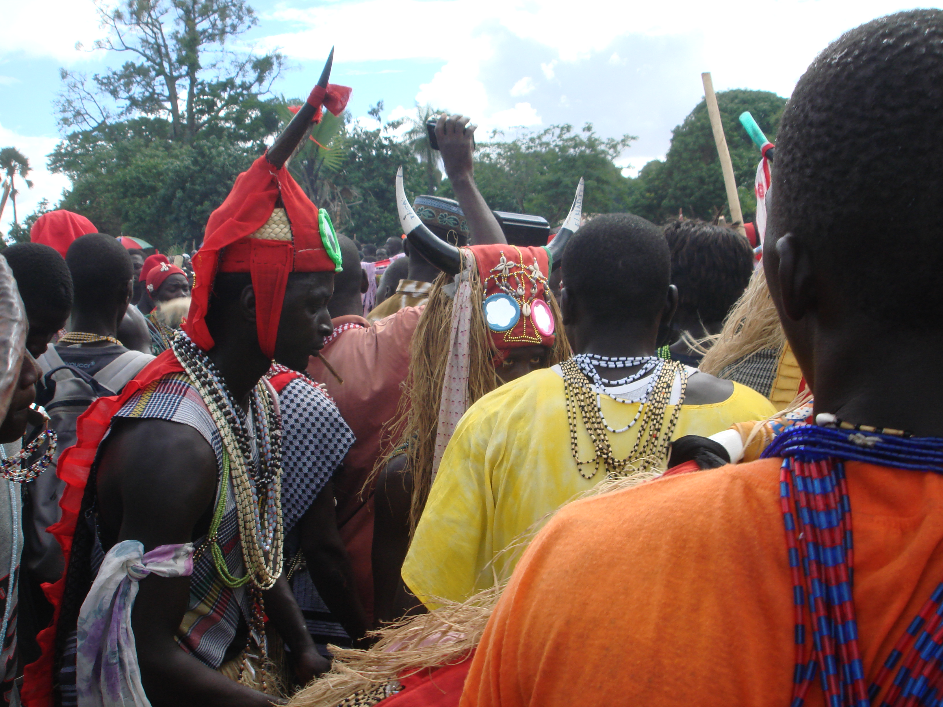 Masques et colliers diola lors du boukout de Baïla (Casamance, Sénégal)